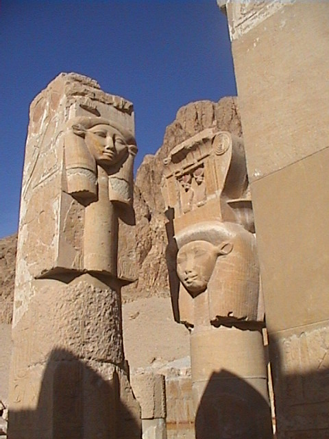 Vue des colonnes à chapiteaux hathoriques du temple d'Hathor de Deir el-Bahari - Louxor - août 2004